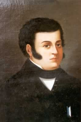 Pedro Moreno, insurgente de la guerra de independencia de México